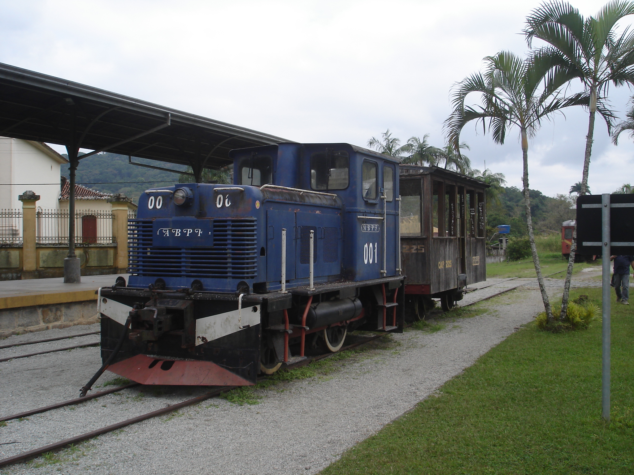 LLD 001 ABPF Antonina, trata-se de uma locomotiva Diesel Mecânica para manobras fabricada na França pela empresa Locomotives et Locotracteurs Diesel-SA. Originalmente pertenceu a Votorantim Cimentos. Atualmente ostenta pintura inspirada na RFFSA (vermelha e amarela) operando ocasionalmente em Curitiba.